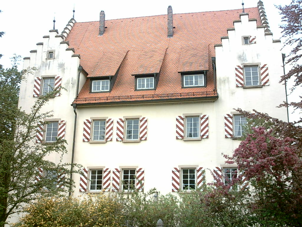 Schloss Wildenstein in Fichtenau bei Dinkelsbühl